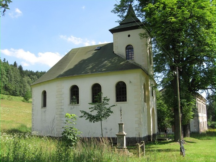 Kaple sv. Jana Křtitele (Hodkovice), Hodkovice